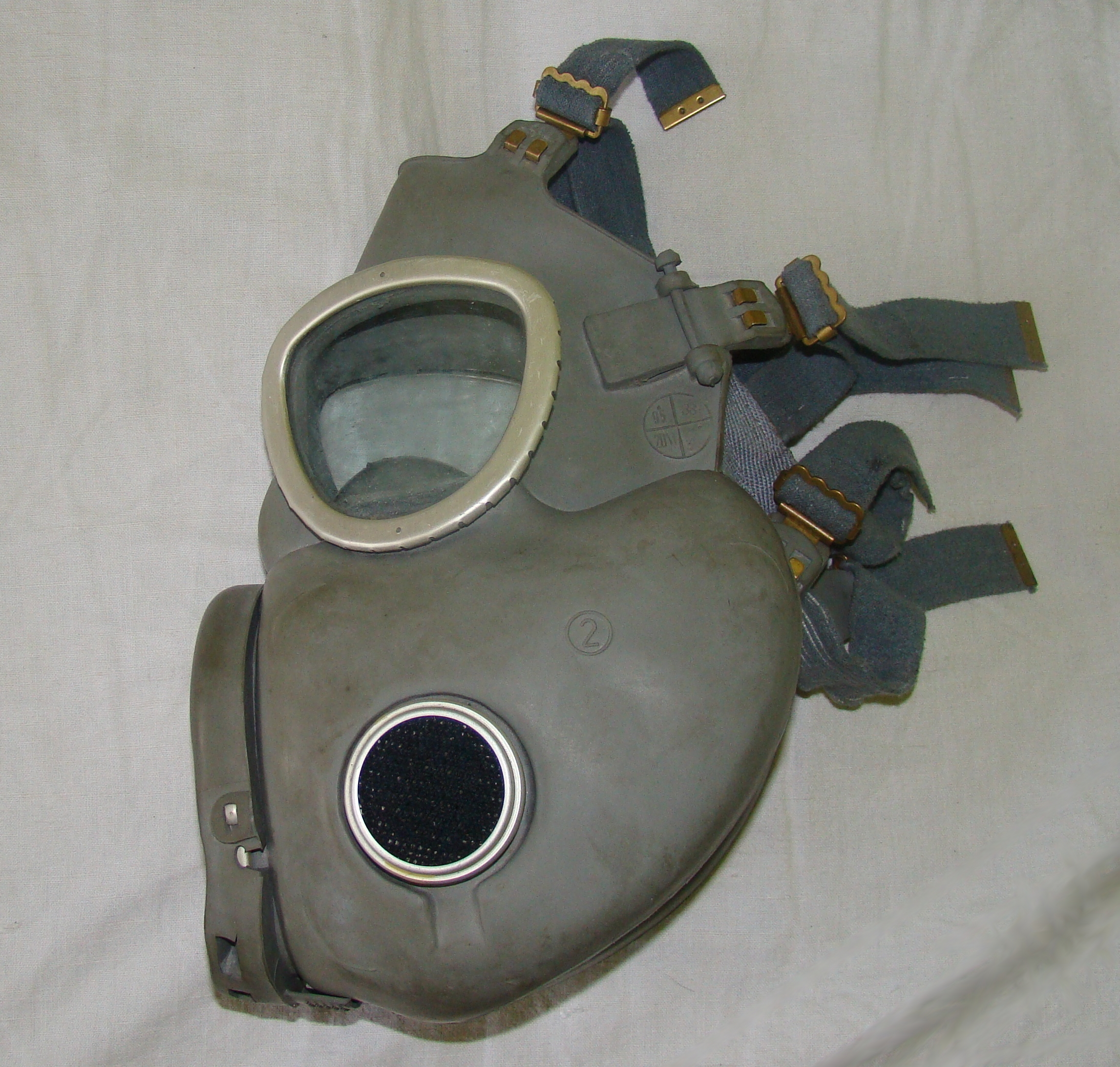 Maska przeciwgazowa MP-4 (polska M-17)